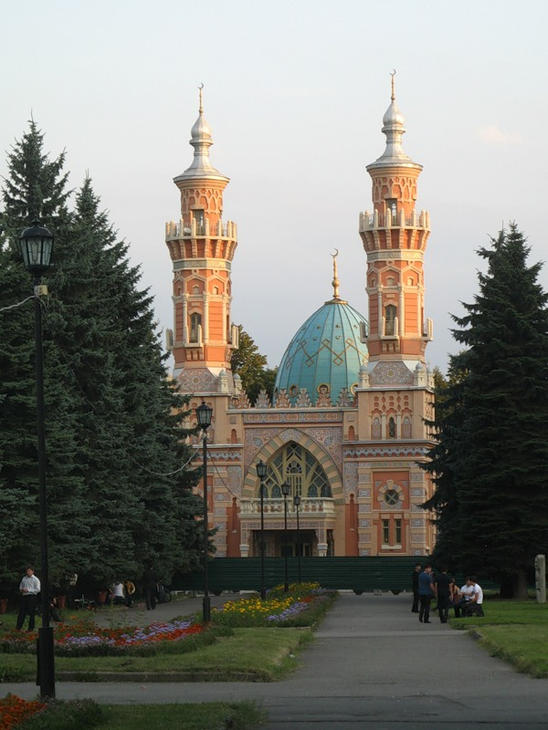 Moskeo en Vladikavkaz, Moskeo.